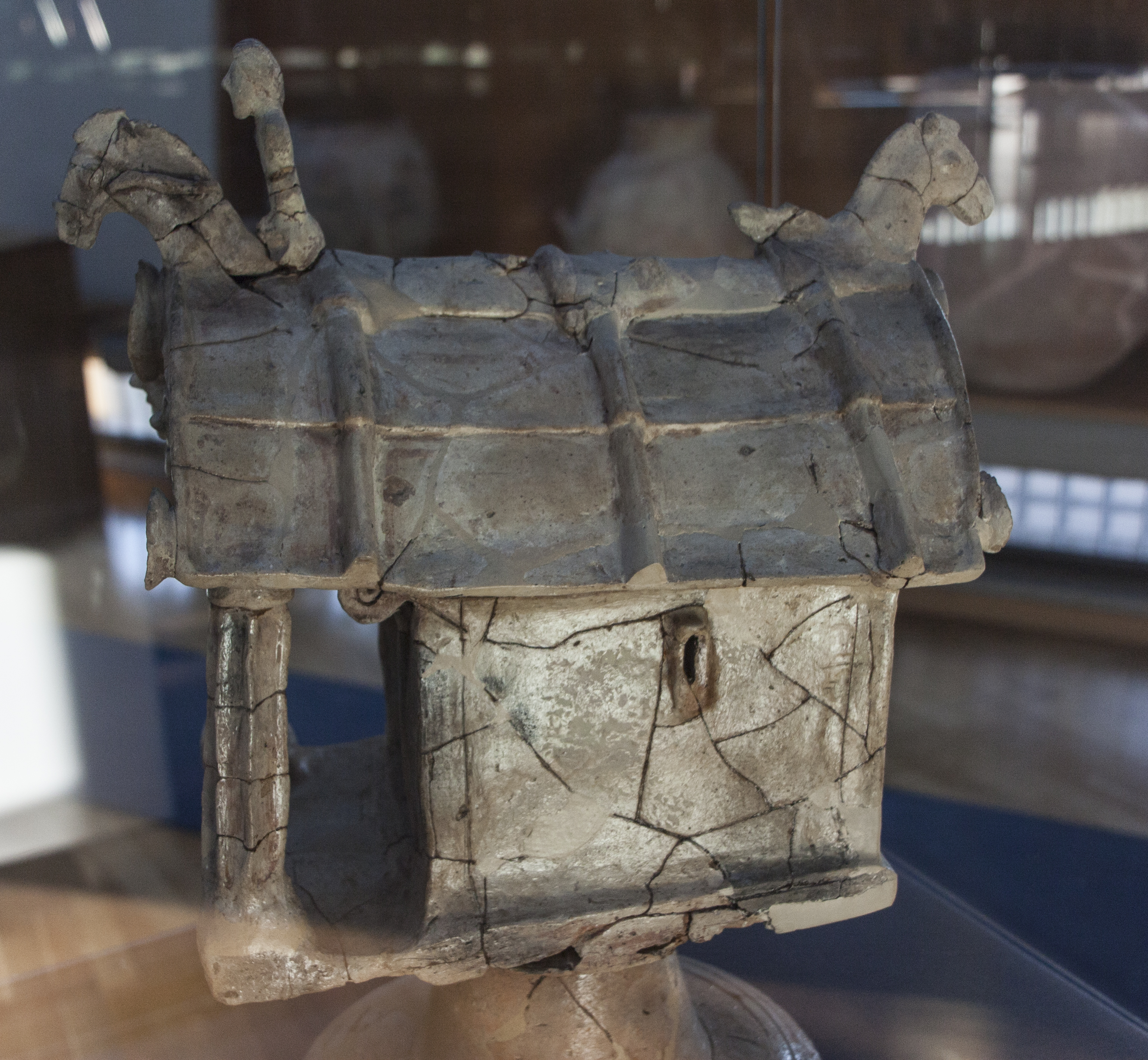 inizi del V sec a.C. Area sacra di Sabucina a sud del muro di fortificazione